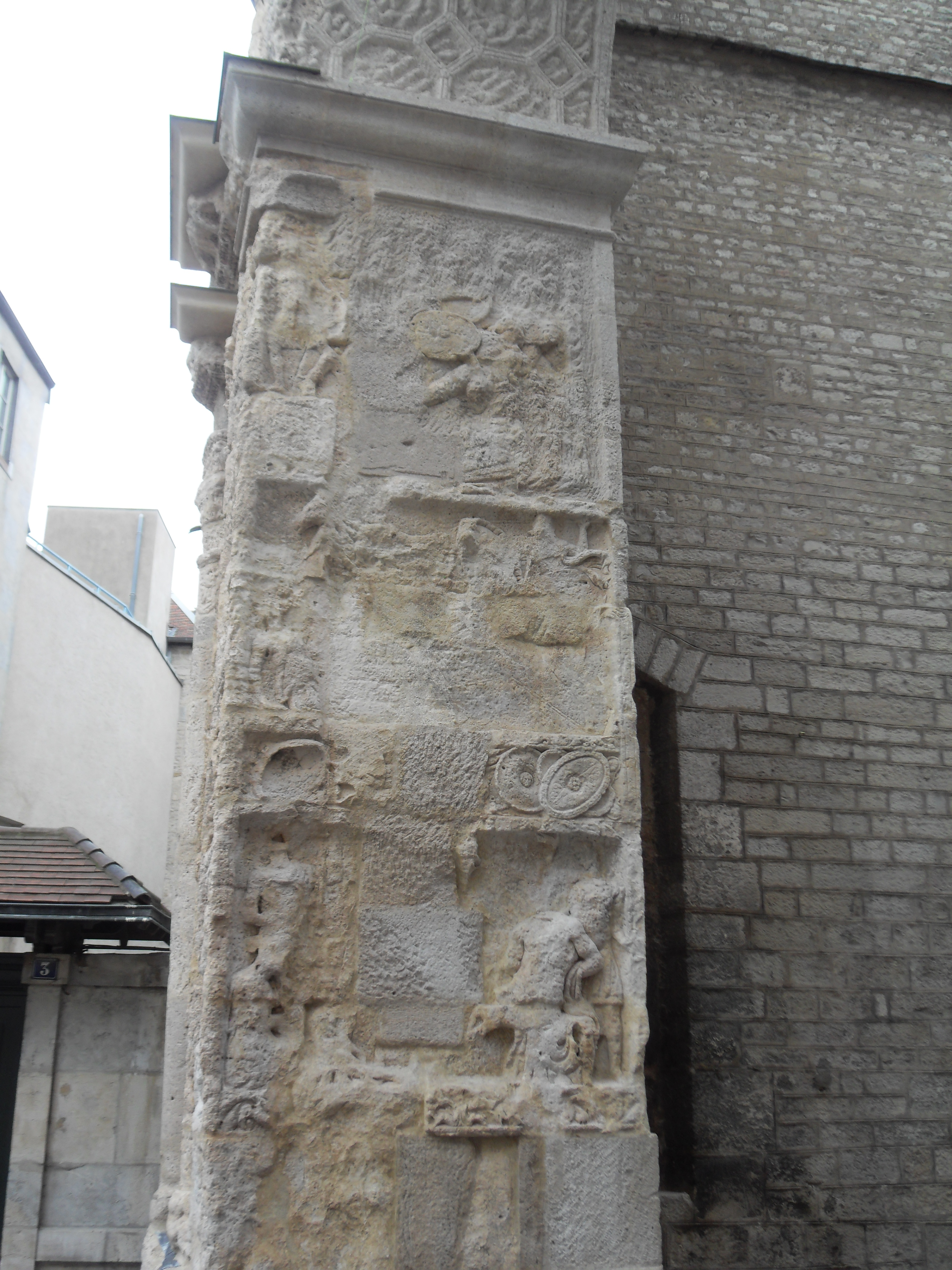 Vue détaillée de la Porte Noire de Besançon: passage du piédroit Est.